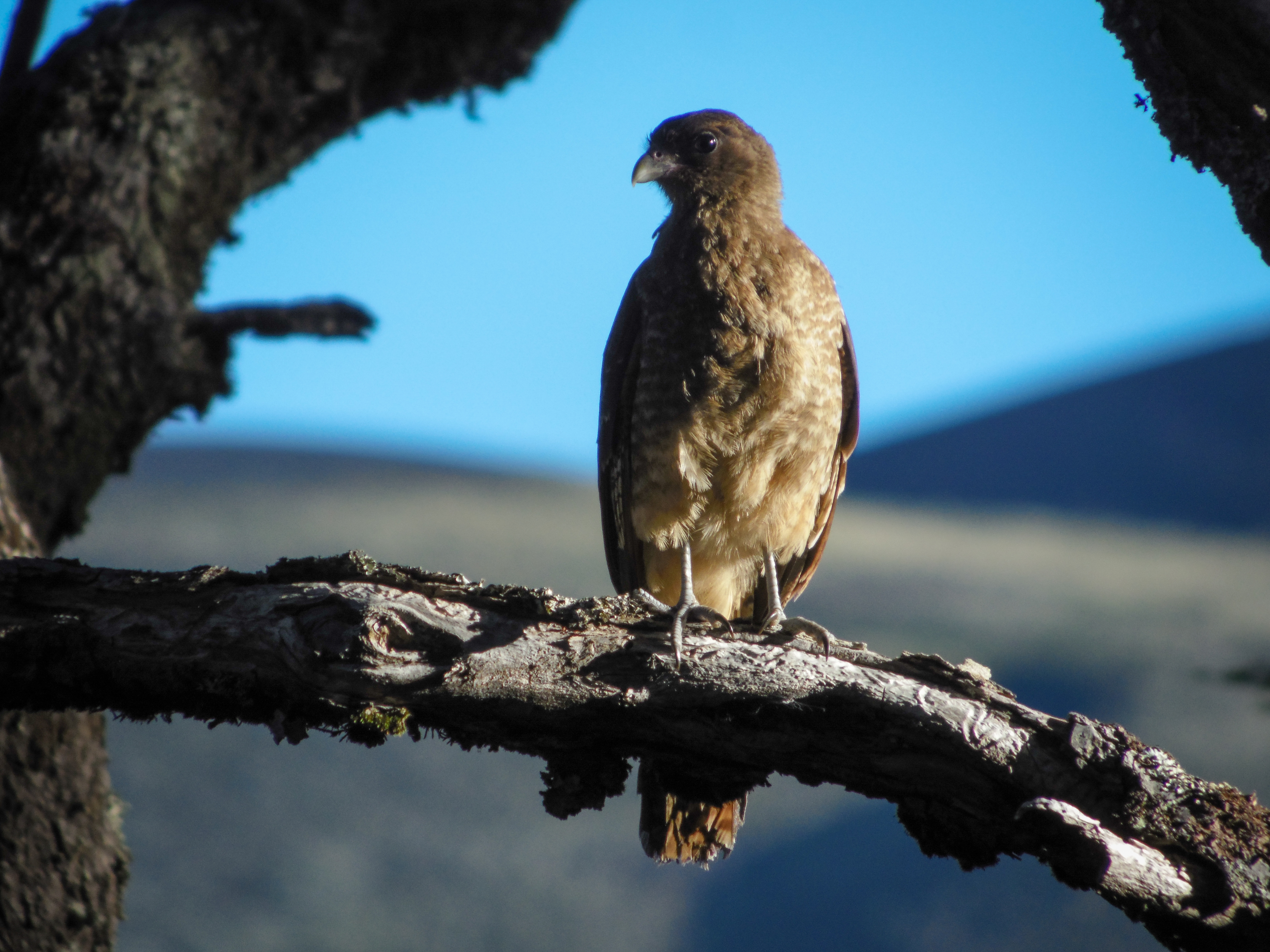 Tiuque (Milvago chimango). Parque Nacional Puyehue, Región de Los Lagos, Chile.